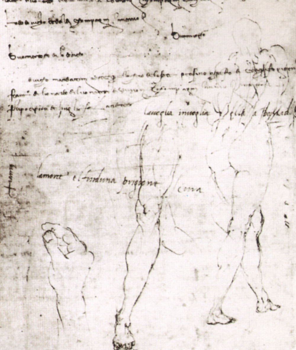 Michelangelo, folio 3, Vol.II,3 casa buonarroti